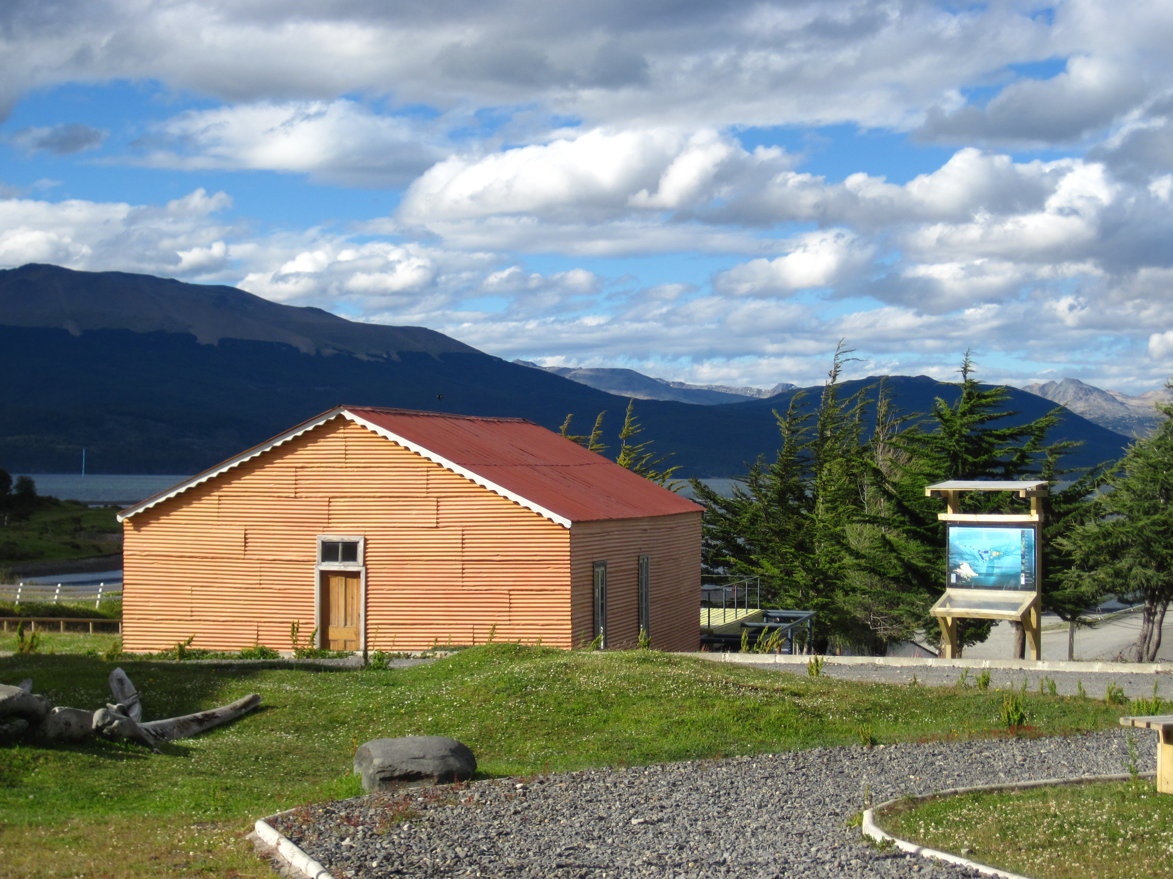 La primera casa construida en Ushuaia perteneciente al misionero anglicano Waite Hockin Stirling, fue trasladada desde su último emplazamiento, a orillas del canal Murray, en la isla chilena de Navarino, a la capital de esa isla, Puerto Williams, para funcionar como un museo de los religiosos ingleses que se aventuraron en el Beagle a fines de 1800. This is a photo of a national monument in Chile: 1818